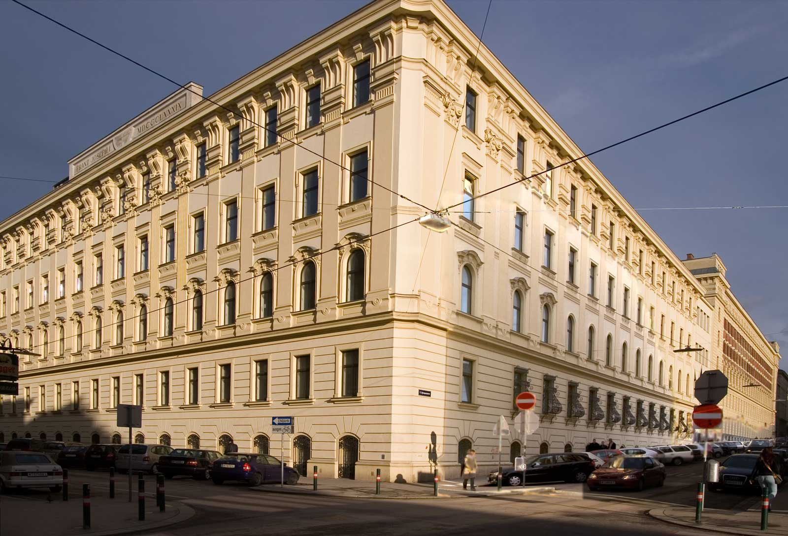 Bildbeschreibung: Frontansicht des A-Gebäudes der HTBLVA Wien V Quelle: selbst fotografiert Fotograf/Zeichner: Michael Schletz Datum: 29.03.2006